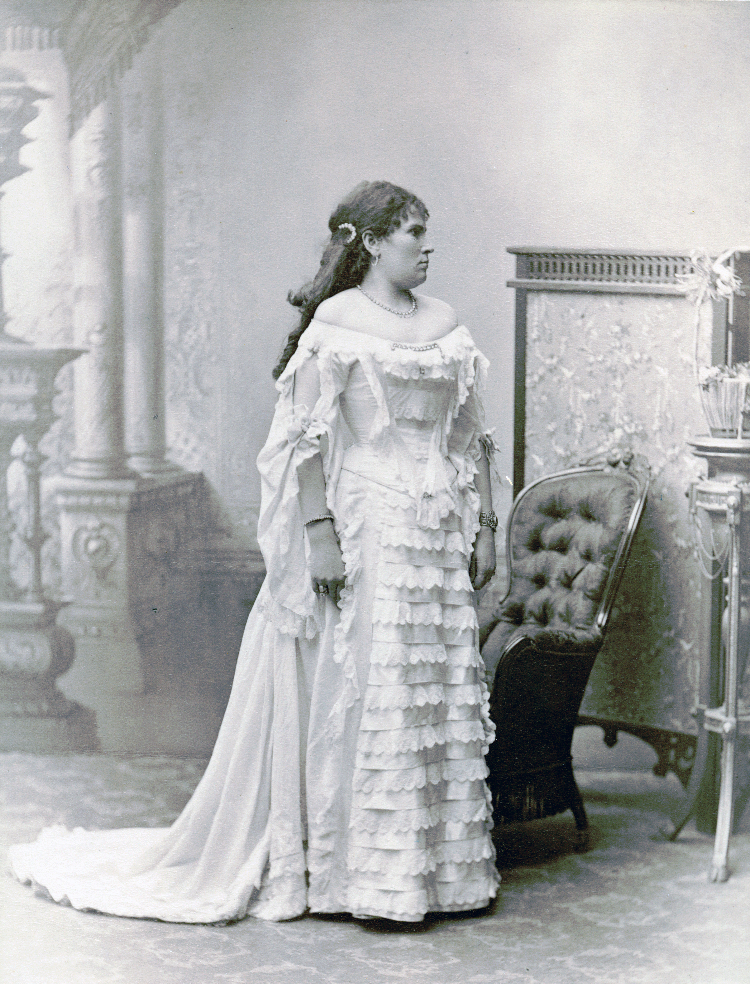 Fanny Lund som Anna Jolanta Branner i Banditen, Folkteatern i Stockholm 1892